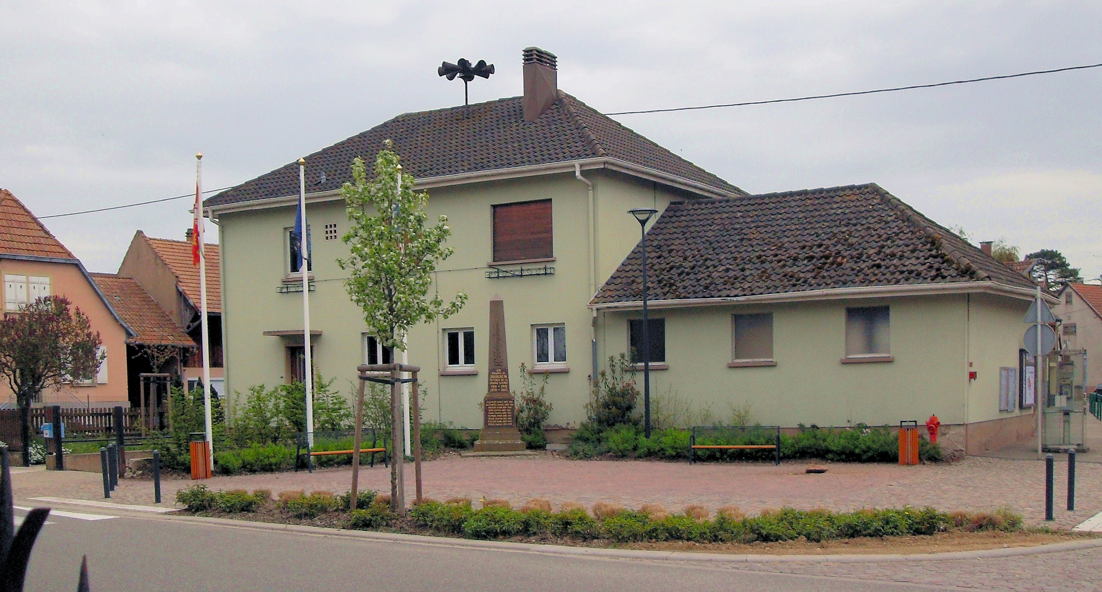 La mairie de Bourgheim